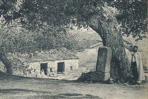 Détail d'une carte postale montrant la "pierre salique" érigée sur la place du Vieux Marché à Djemâa Saharidj (Algérie, wilaya de Tizi Ouzou, commune de Mekla). Cette pierre, disparue depuis, commémorait l'exhérédation des femmes kabyles.